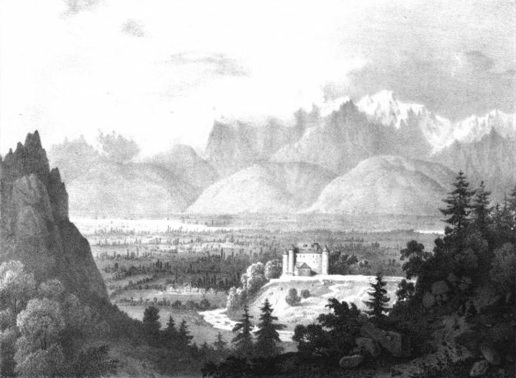 Album du Dauphiné - tome IV, litographie du Chateau de Craponoz, à Bernin (Isère).